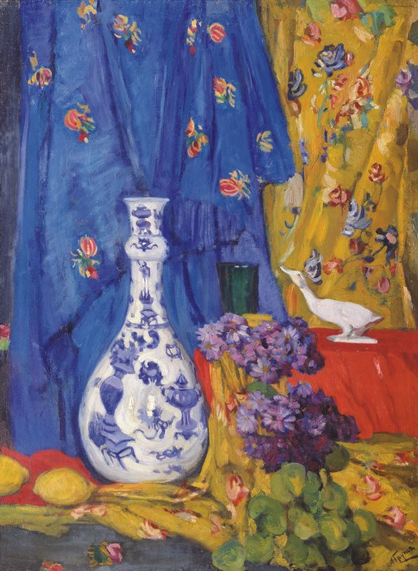 Гауш А.Ф. "Китайская ваза", 1915-1916. Работа находится в собрании Третьяковской галереи.